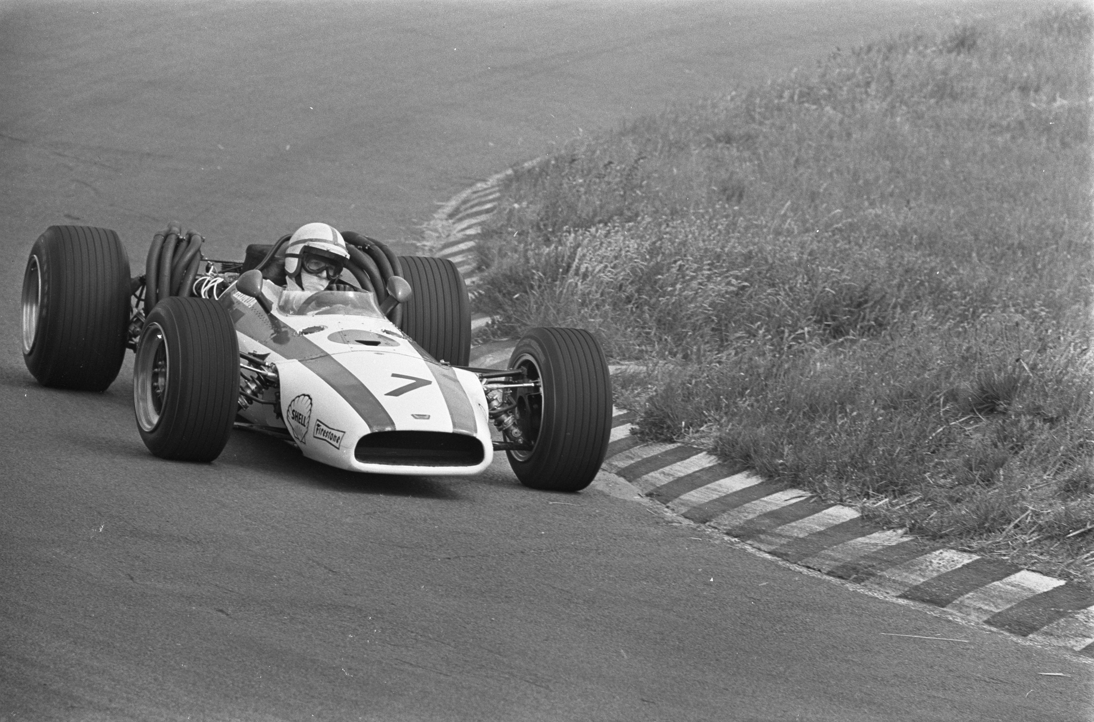 Grand Prix 68 Zandvoort . Nummer 4 J. Surters , nummer 5 Graham Hill , nummer 6 Surters, nummer 7 Oliver.